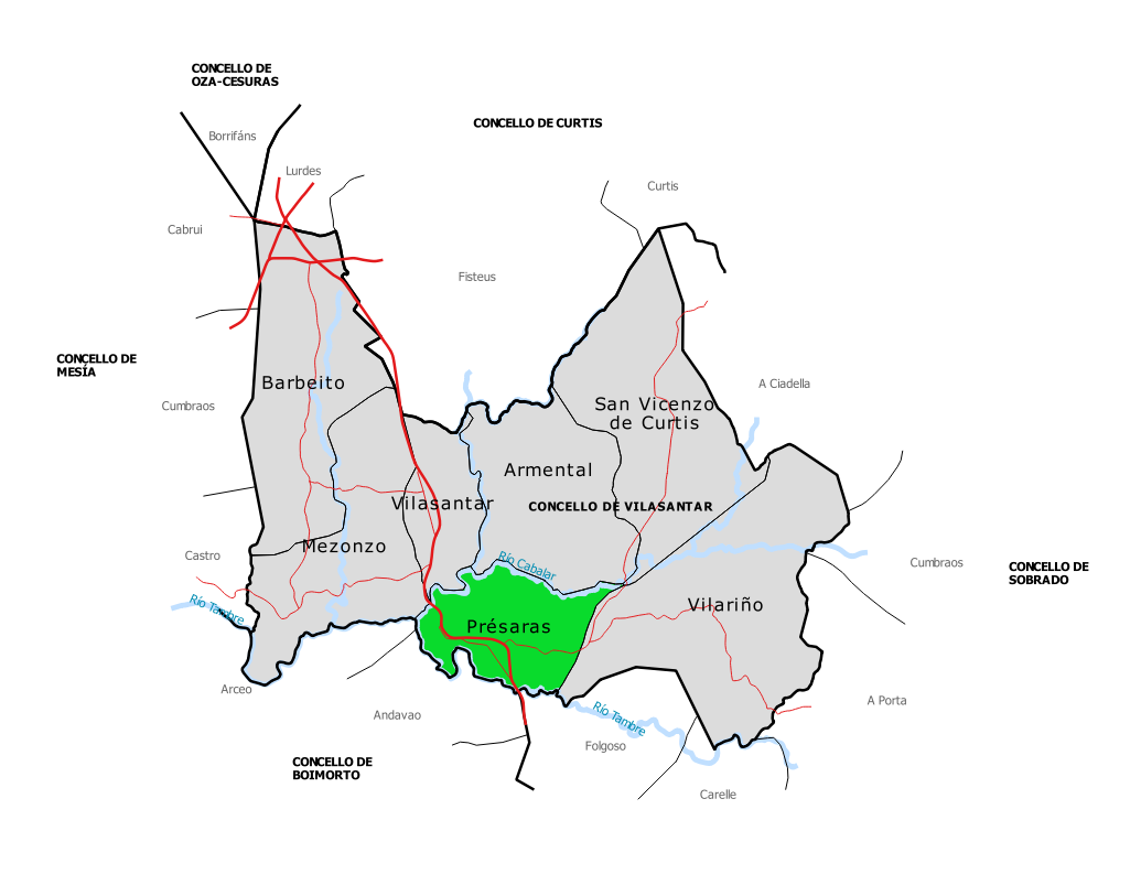 Mapa da parroquia de Présaras no concello de Vilasantar (Galiza).